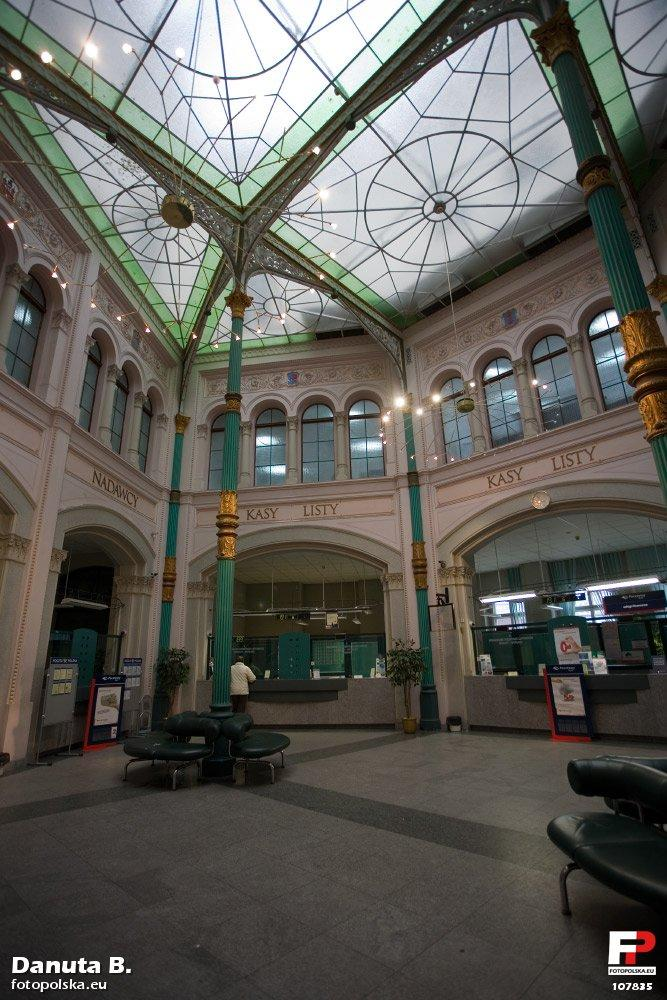 Nie miałam szczęścia do słonecznej pogody w Szczecinie, próbowałam po raz kolejny sfocić piękny budynek poczty. Przechodząc mimo ujrzałam, że jest czynna przez cała dobę. Akurat dyżurny ochroniarz zajęty był rozmową w przedsionku, udało mi się niepostrzeżenie szybko sfocić wnętrze.